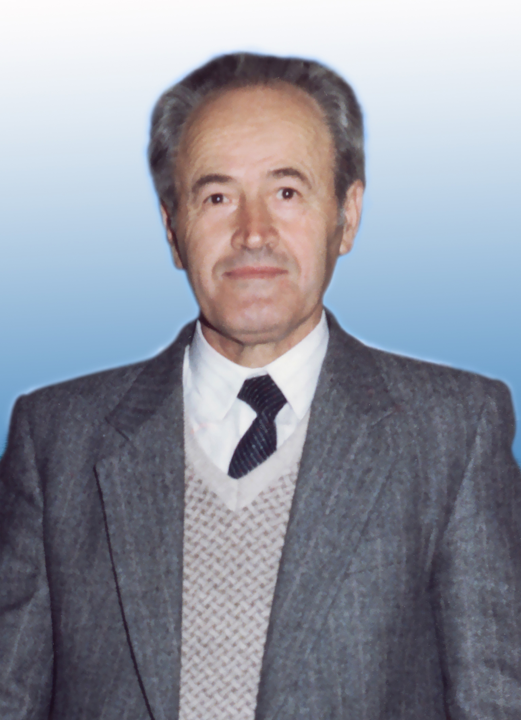 Φωτογραφία Κυριάκου Παπακυριάκου